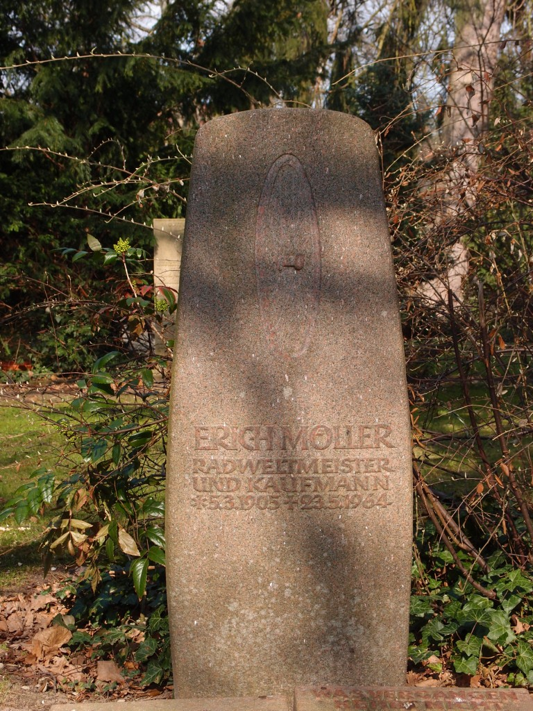 Grab von Erich Möller auf dem Engesohder Friedhof in Hannover